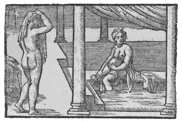 Badescene